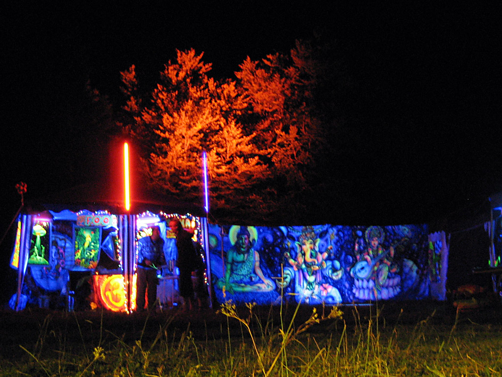 Outdoor Party, Grenchenberg, Schweiz